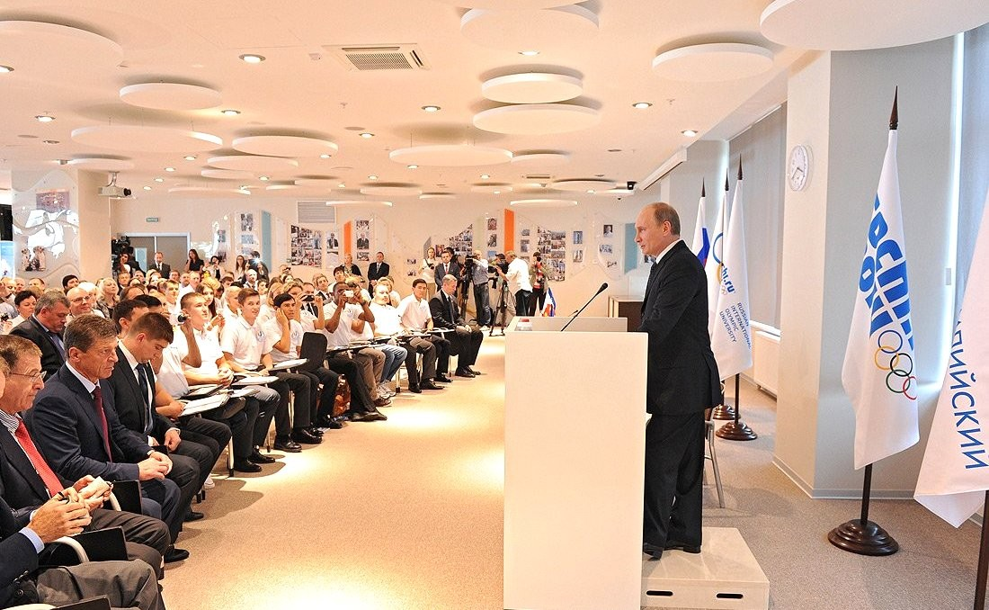 Выступление президента Путина на открытии Российского международного олимпийского университета перед студентами и преподавателями 16 сентября 2013 года